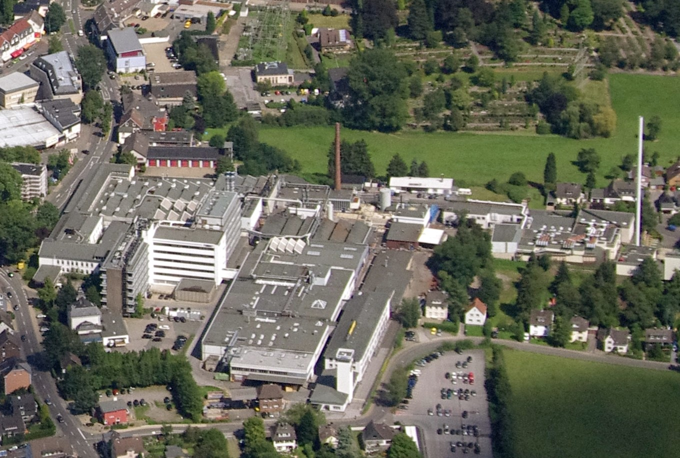 Luftaufnahme von Burscheid aus südwestlicher Richtung